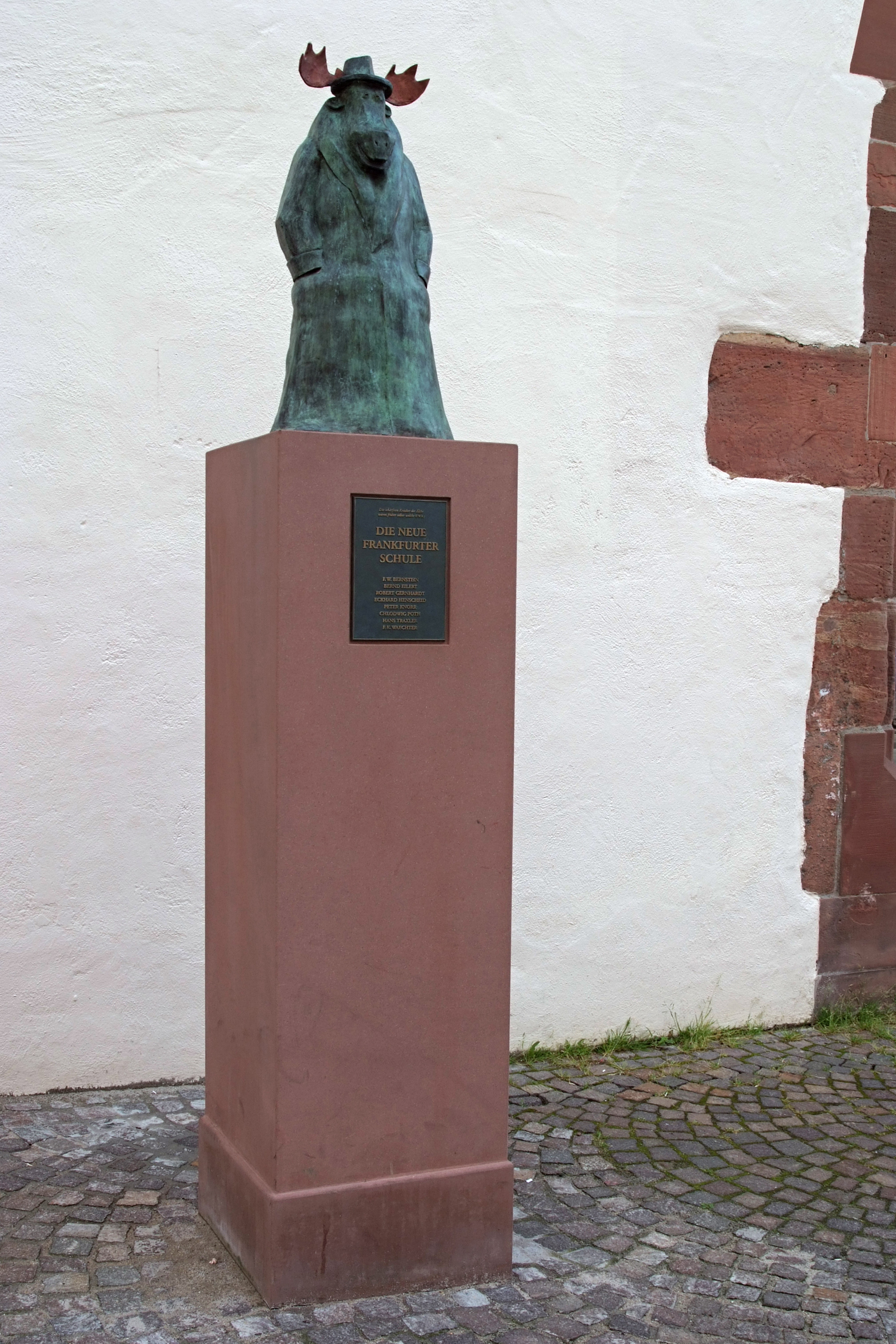 Die schärfsten Kritiker der Elche waren früher selber welche.